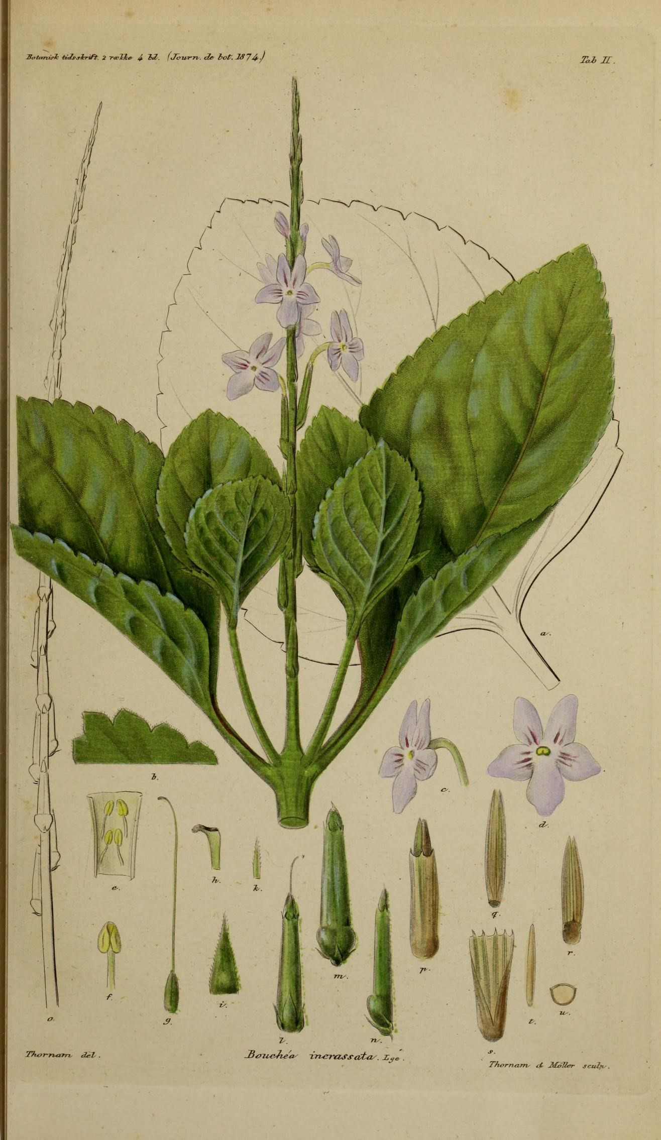 Botanisk tidsskrift / utgivet af den Botaniske forening i København.